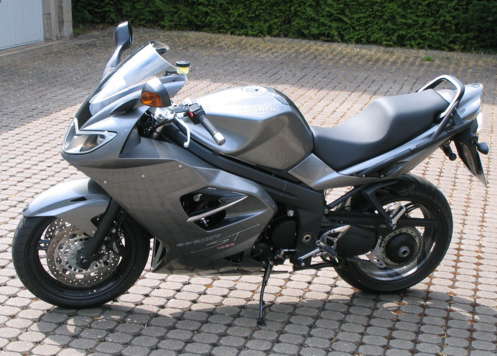 Bild einer Triumph Sprint ST 1050, Baujahr 2008